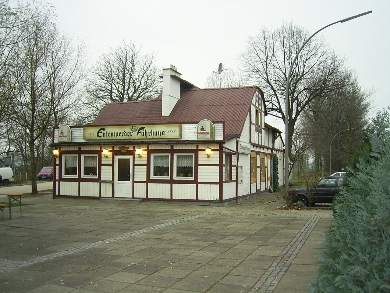 Das Entenwerder Fährhaus am Südostende der Halbinsel Entenwerder in Rothenburgsort ist seit 1872 ein beliebtes Ausflugslokal.